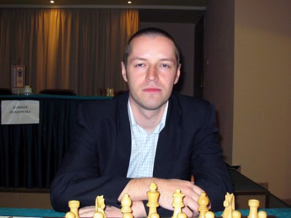 Piotr Bobras, Poznań 2005